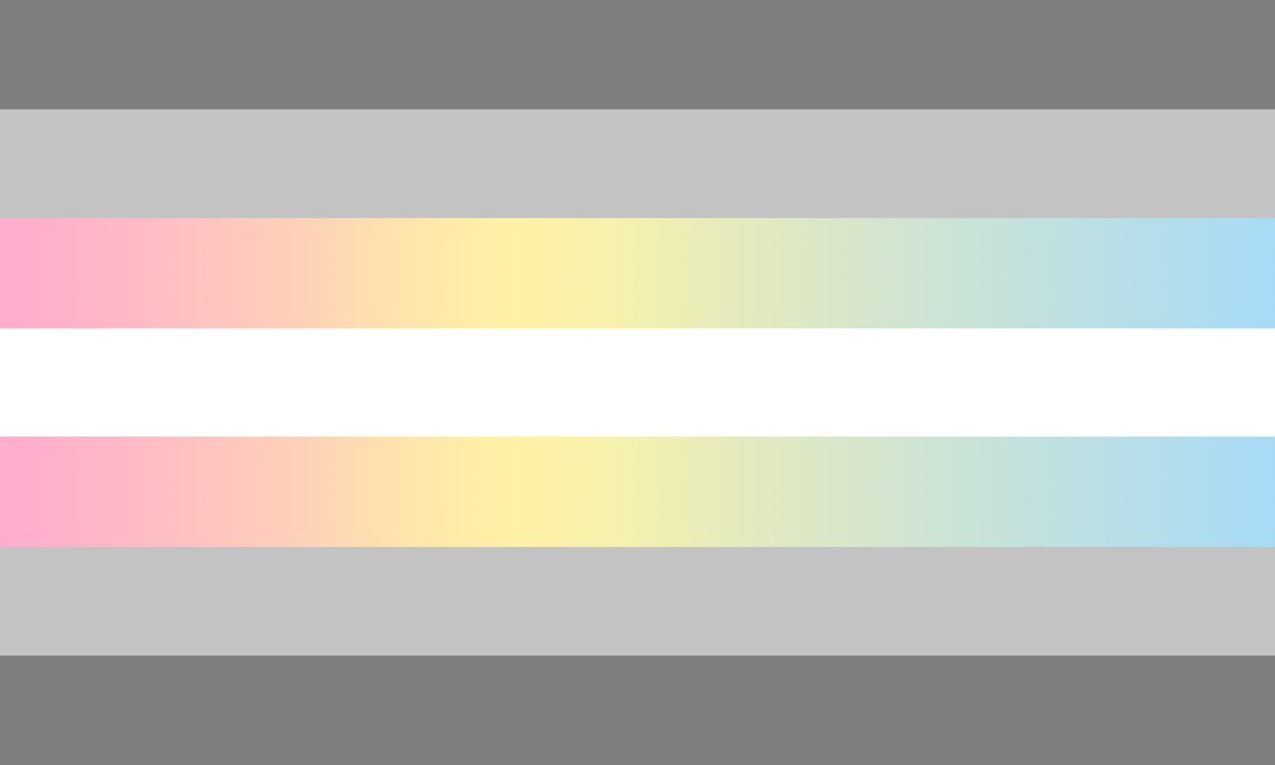 Demiflux Pride Flag